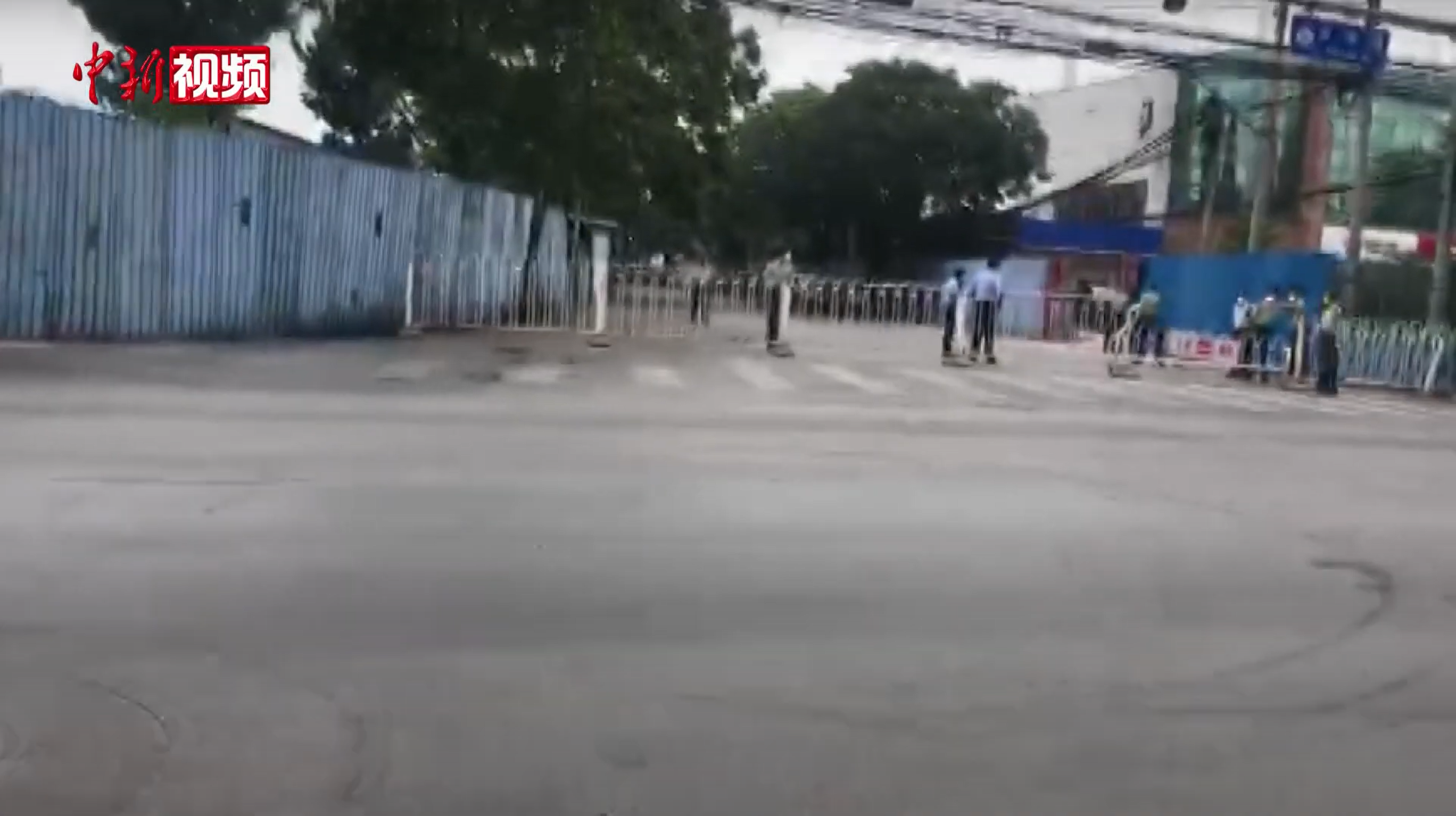 中文（中国大陆）: 新发地市场周边部分道路戒严管控